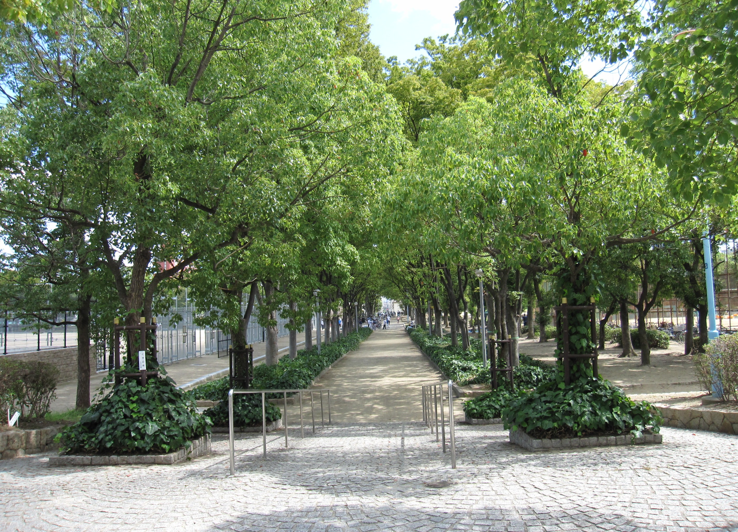 泉尾公園入口